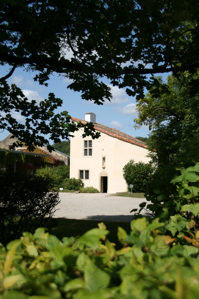 Maison natale de Jeanne d'Arc .